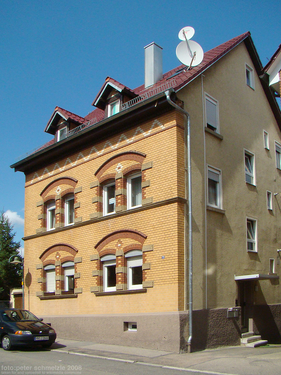 Denkmalgeschütztes Gebäude Eppinger Str. 72 in Heilbronn-Böckingen